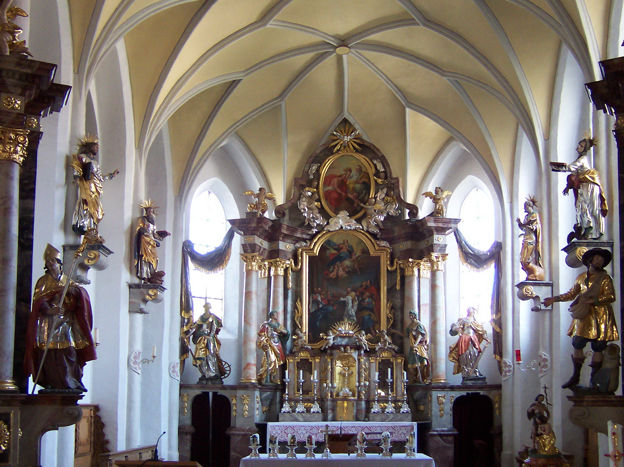 Essenbach, Rathausplatz 13. Katholische Kirche Mariä Himmelfahrt. Saalbau mit später angefügten Seitenschiffen, heute Staffelhalle, spätgotischer Bau um 1470, durch Seitenschiffe um 1670 und nochmals 1713 erweitert, im Kern romanischer Turm, spätgotisch erhöht, zunächst freistehend, 1713 in das südliche Seitenschiff integriert, Chor gegliedert durch Dreieckslisenen und Dachfries, mit Putzgliederung. Chorraum mit Netzgewölbe.